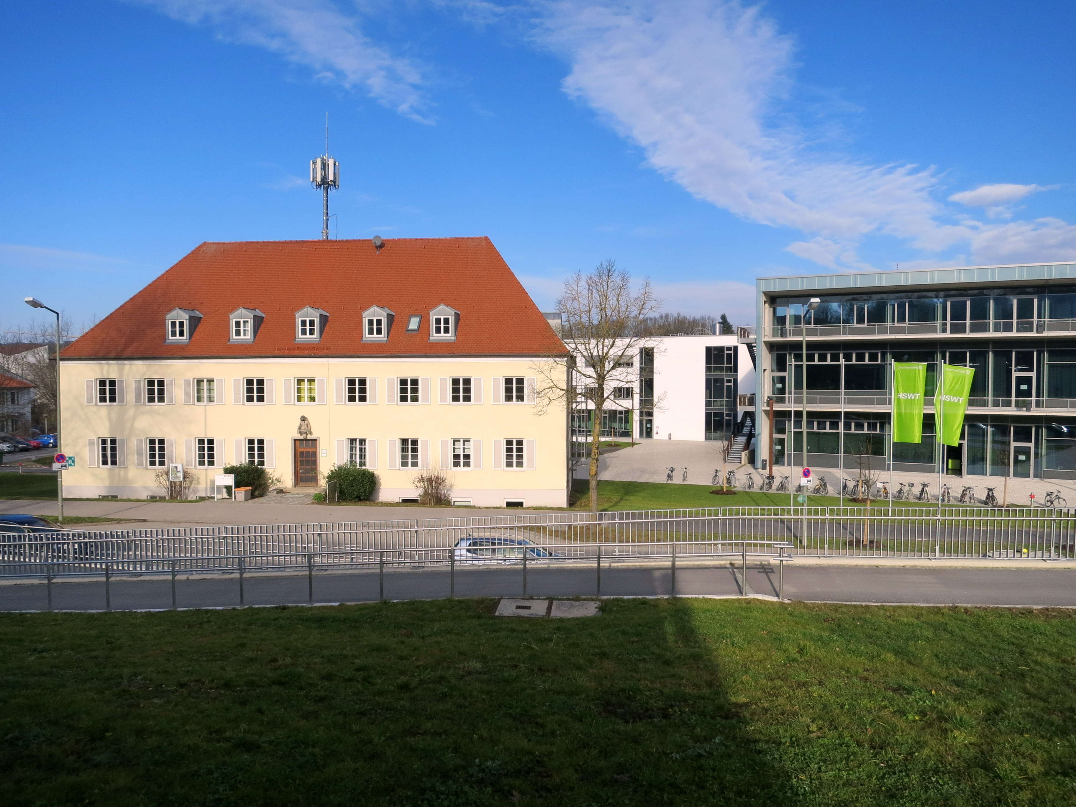 Altes Gebäude der LfL, Verwaltung 03